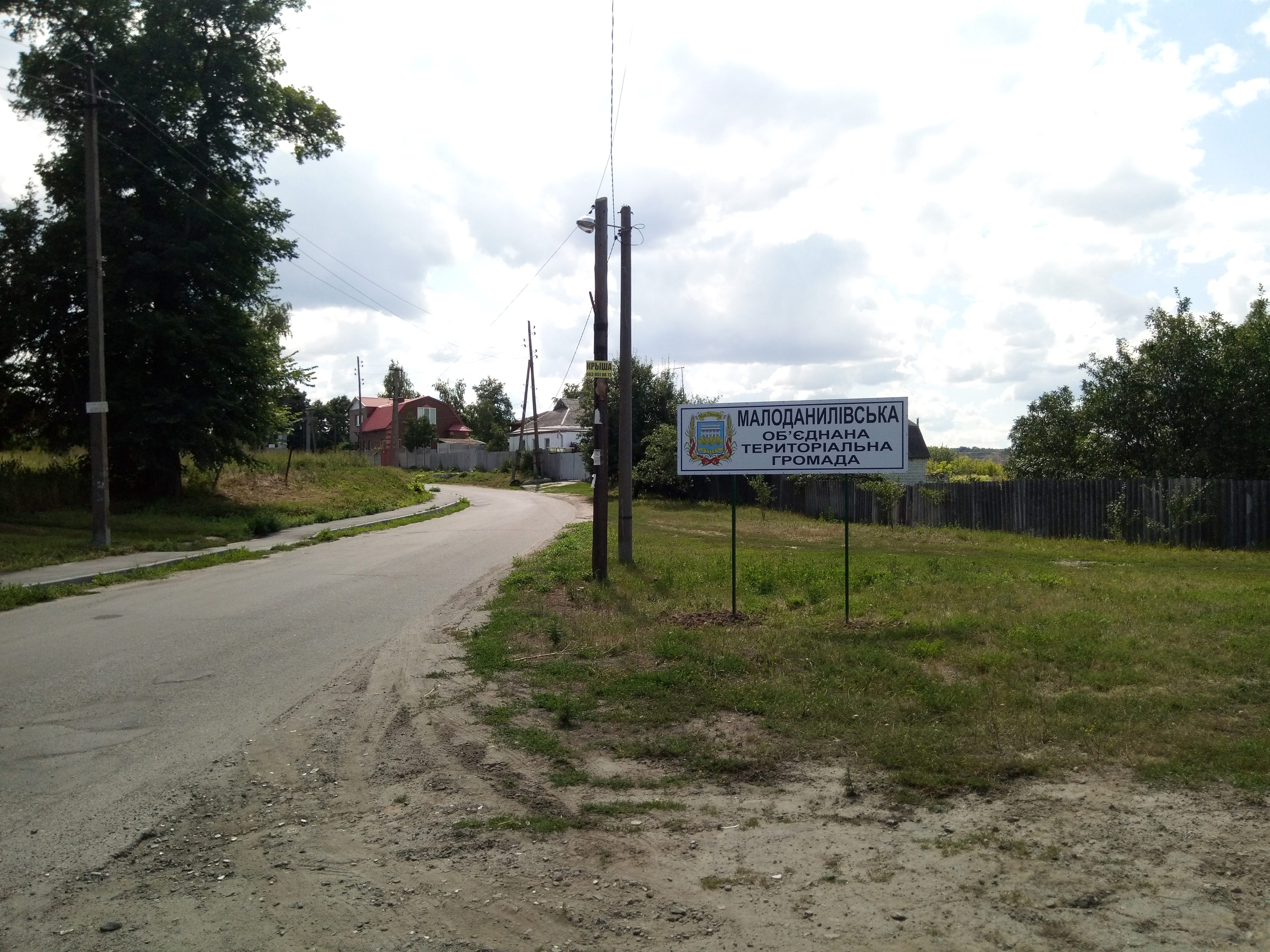 Табличка з назвою Малоданилівської селищної об'єднаної територіальної громади на в'їзді у село Лужок Дергачівського району Харківської області